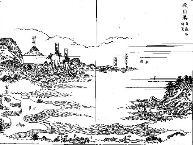 久志秋目郷の秋目浦の挿絵。